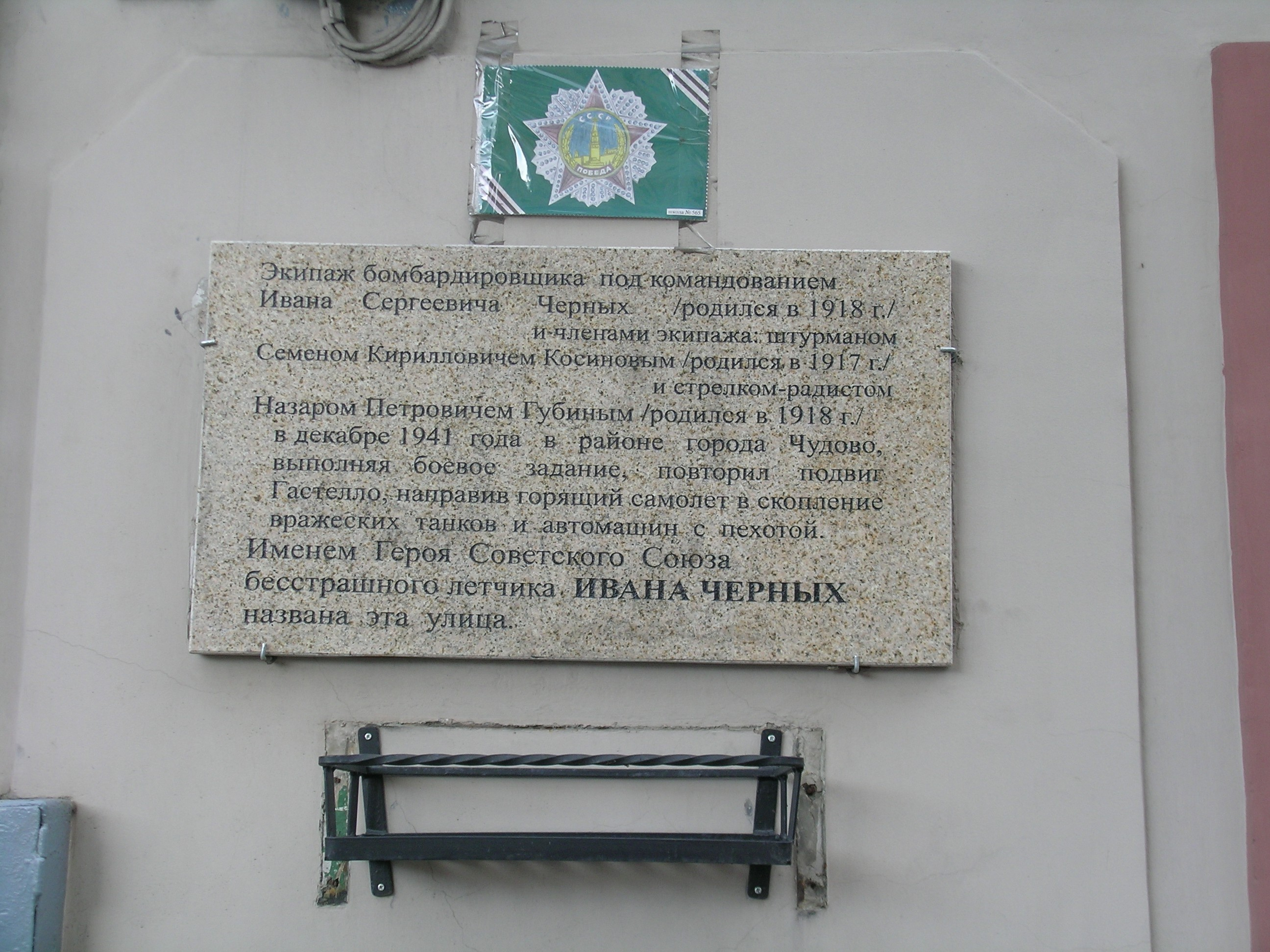 Мемориальная доска на ул. Ивана Черных [1]. «Экипаж бомбардировщика под командованием Ивана Сергеевич Черных /родился в 1918 г./ и членами экипажа: штурманом Семёном Кирилловичем Косиновым /родился в 1917 г./ и стрелком-радистом Назаром Петровичем Губиным /родился в 1918 г./ в декабре 1941 года в районе города Чудова, выполняя боевое задание, повторил подвиг Гастелло, направив горящий самолёт в скопление вражеских танков и автомашин с пехотой. Именем Героя Советского Союза бесстрашного лётчика Ивана Черных названа эта улица.»